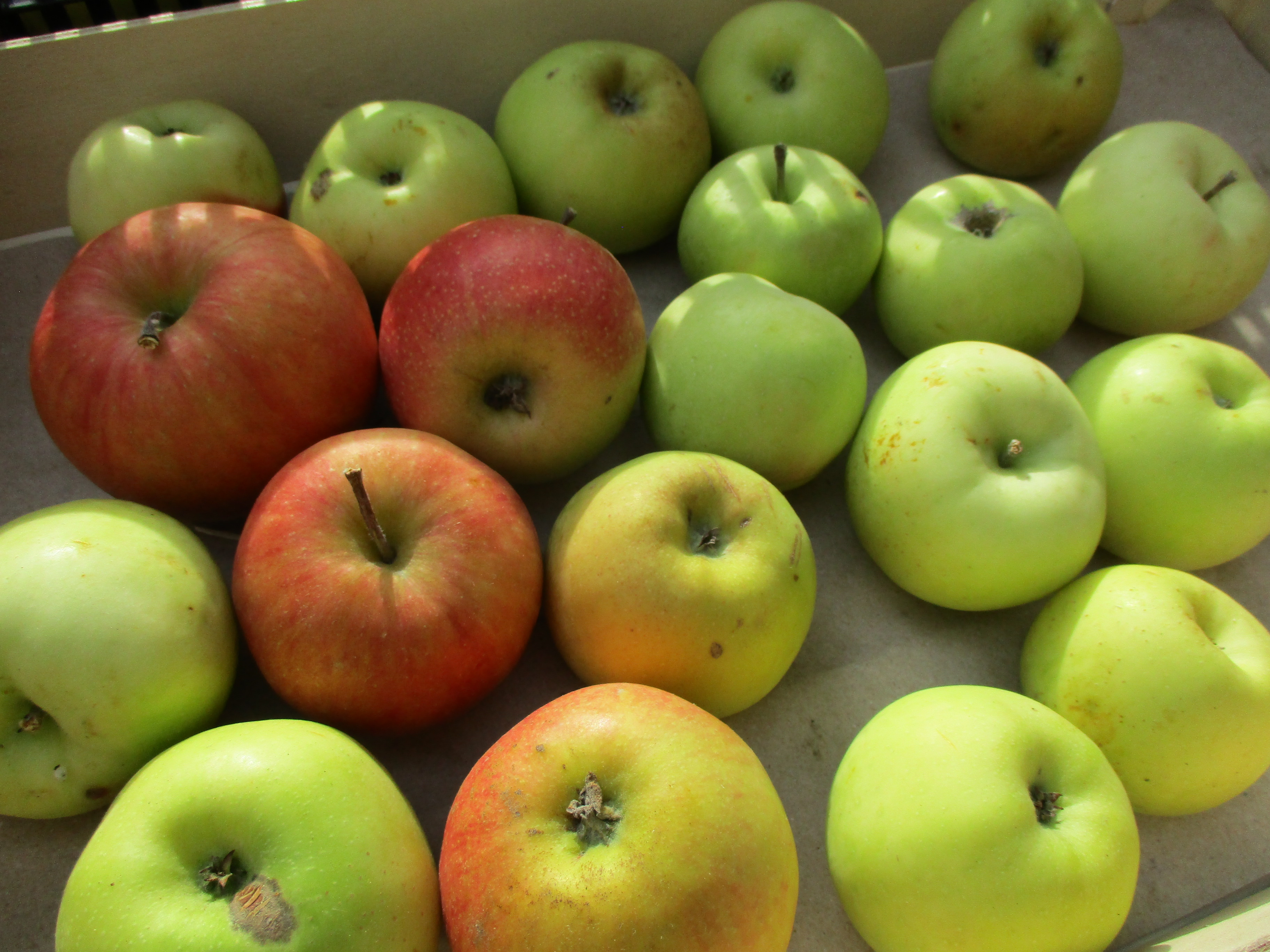 Mele della valle del Giovenco